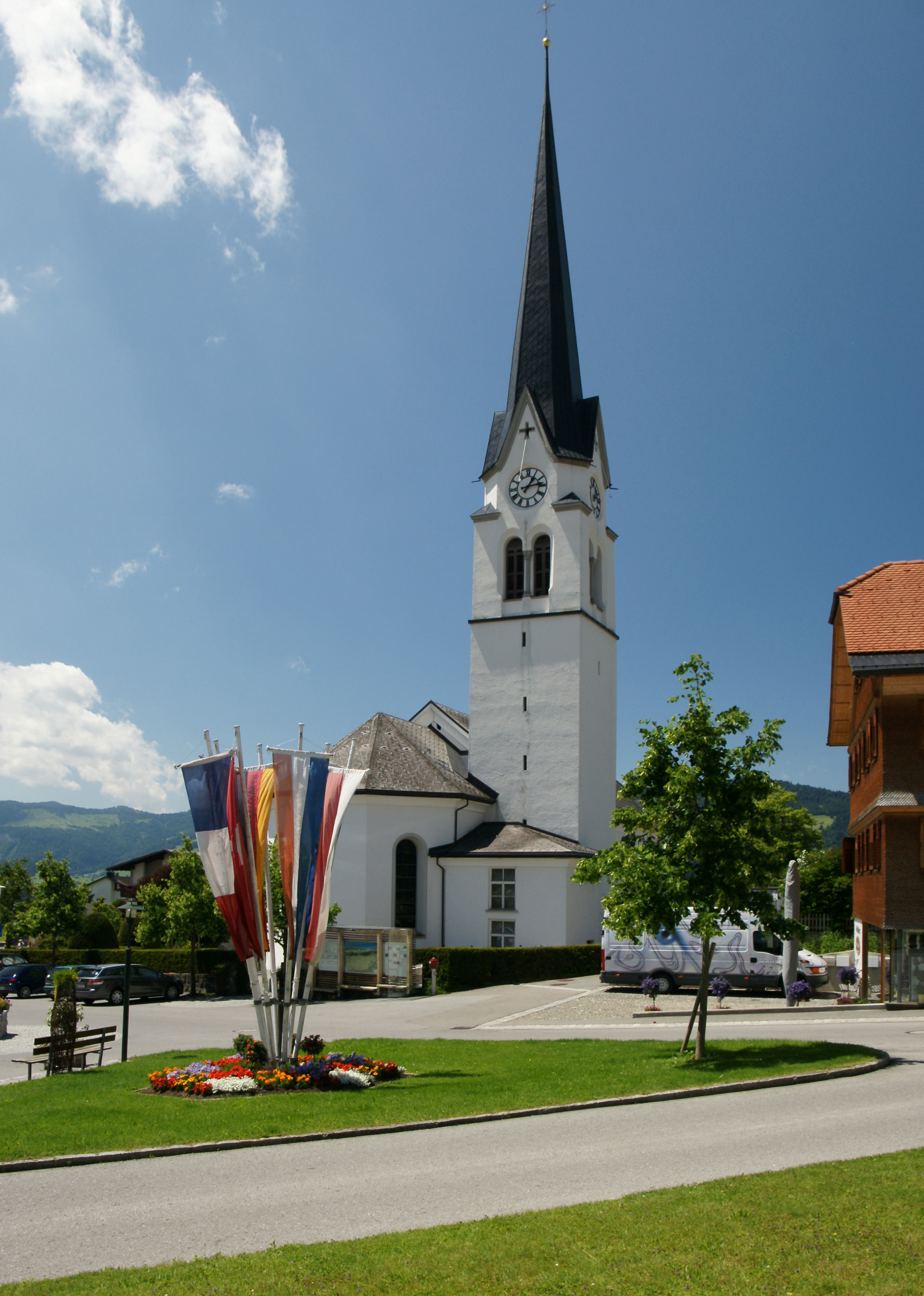 Pfarrkirche hl. Johannes d.T. in Lingenau im Bregenzerwald.